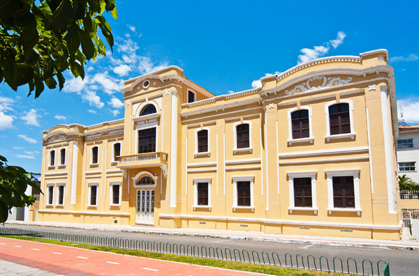 Sede da ACL - Fpolis/SC